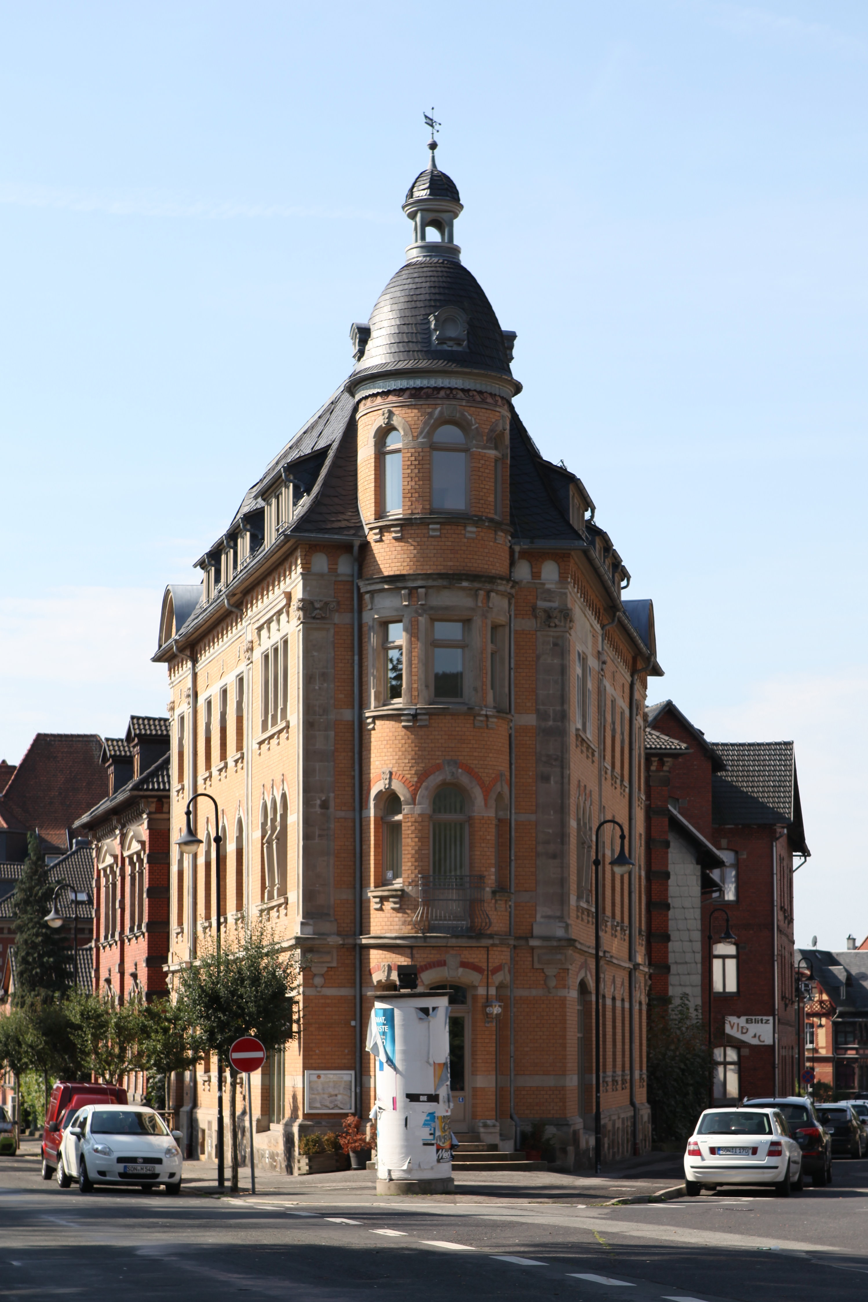 Massivbau mit Walmdach und turmartigem Anbau (im Volksmund wg. Grundriss Bügeleisen), 1901, von Bernhard Brückner, Sonneberg, Gustav-König-Straße 2